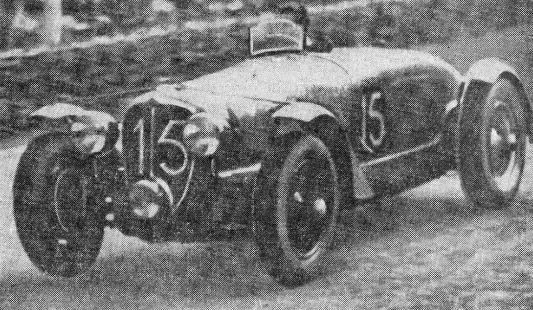 24 Heures du Mans 1938, victoire de Chaboud et Trémoulet sur Delahaye 3.5L.